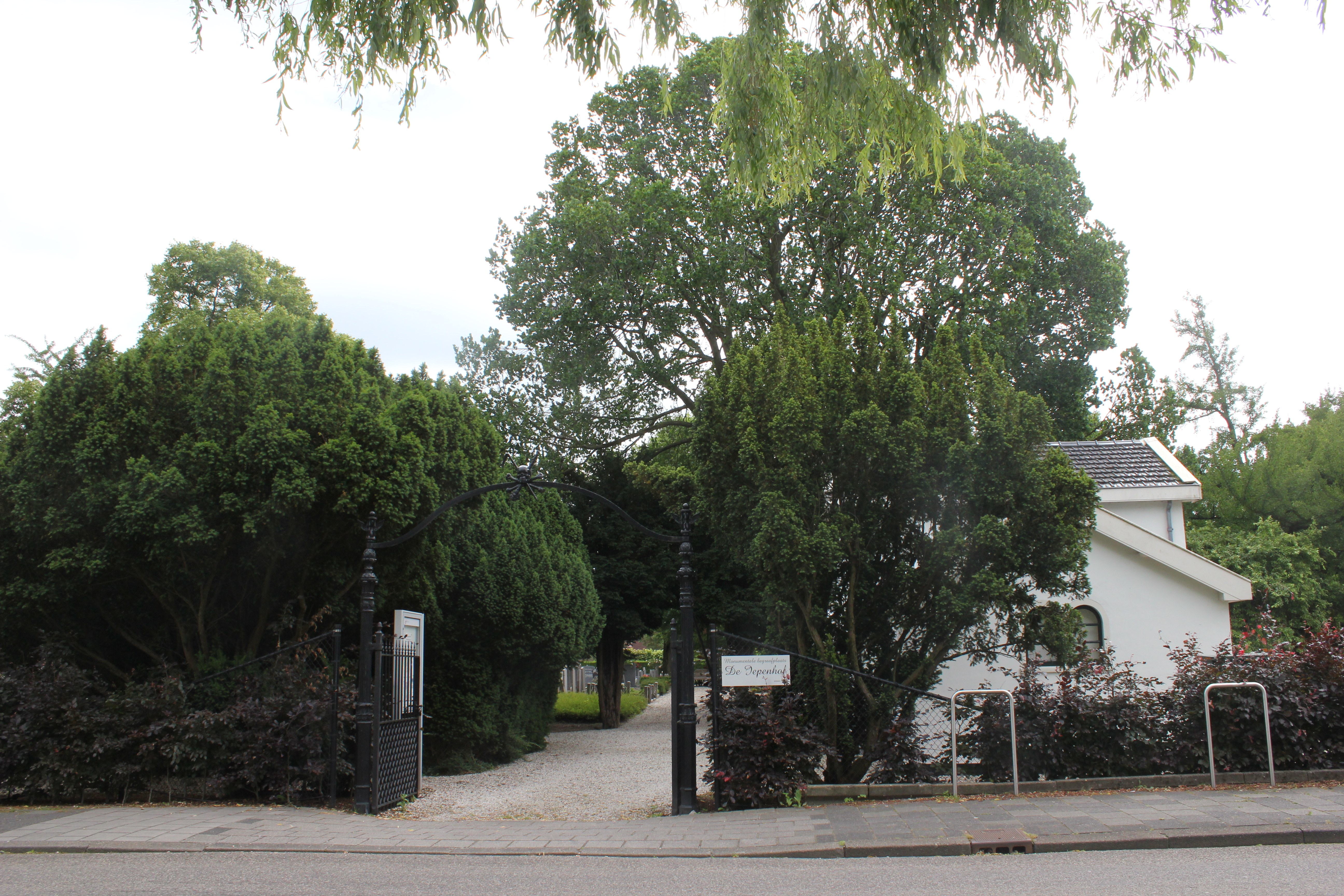 Begraafplaats Iepenhof Hoofddorp (Ingang)